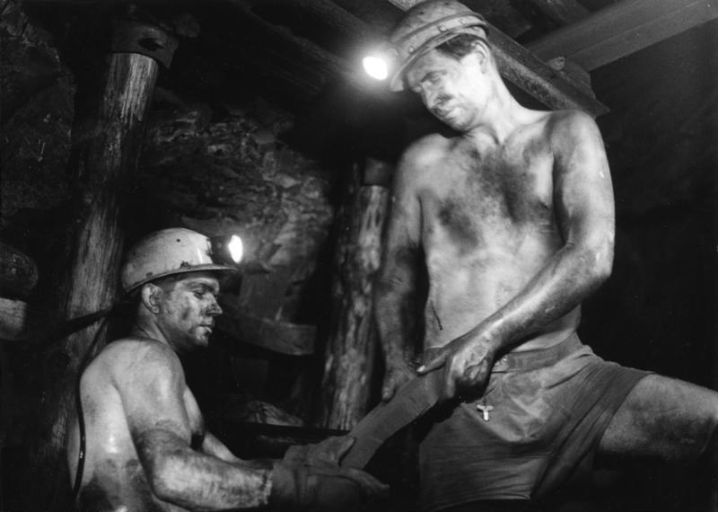 Ruhrbergbau-Essen Gemeinsame Arbeit unter der gesicherten Firste